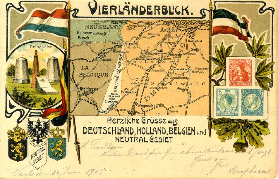 Vierlandenpunt Vaals. Bron: Kaart uit 1905